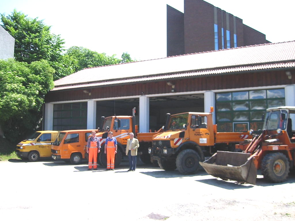 Bauhof Runding mit zwei Bauhofarbeitern und Altbürgermeister Willi Hastreiter